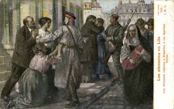 Les Allemands à Lille – "Les Allemands séparent et déportent les familles lilloises". Date : 1914-1918 Dimensions : 86 x 138 mm - Technique : impression photomécanique (carte postale) Visé Paris n°2560. Texte imprimé en espagnol critiquant le comportement et les actes des Allemands envers les Français du Nord. Carte postale d'après un dessin.